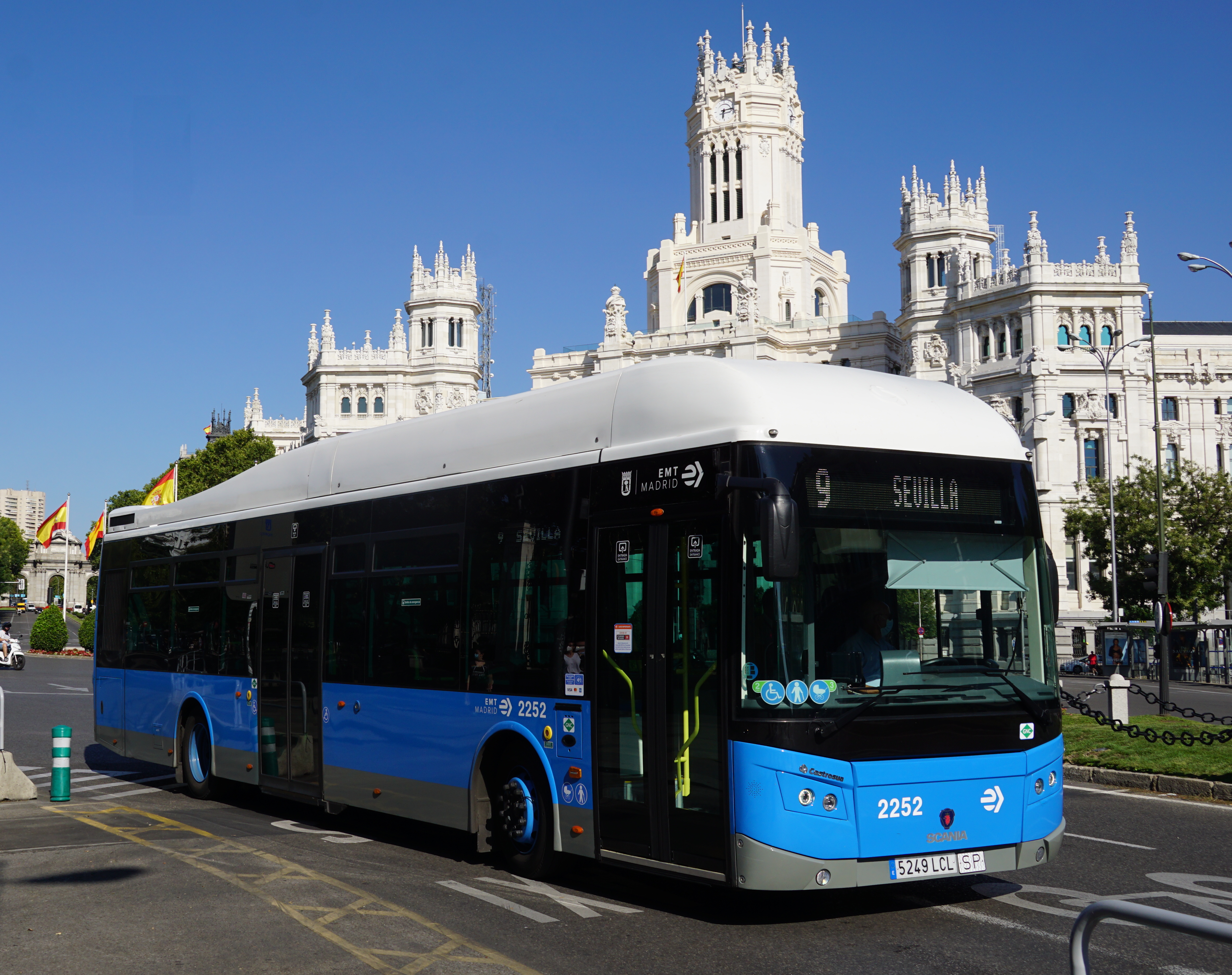 9 EMT Madrid en la calle Alcalá, agosto 2020